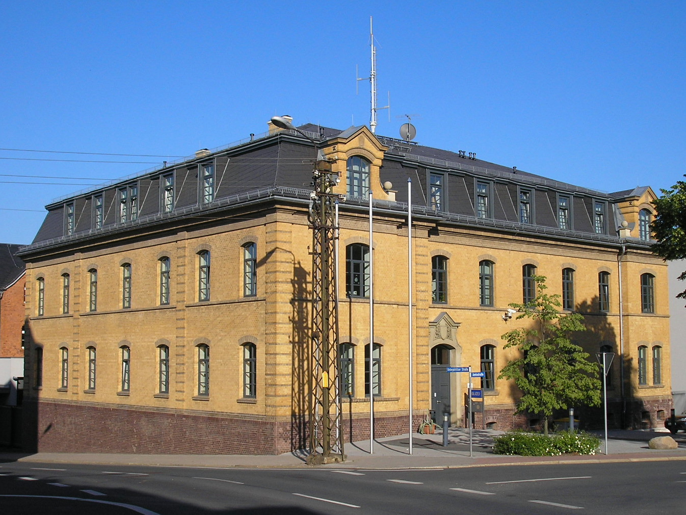 Die Polizeiwache Ilmenau (Thüringen).